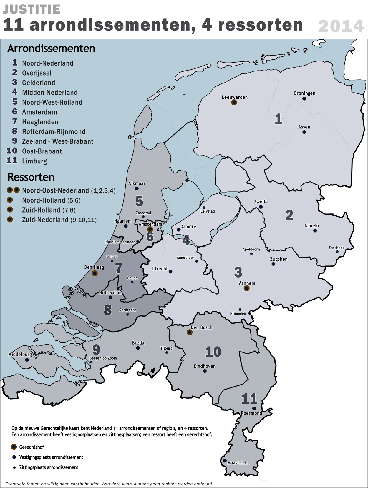 Overzichtskaart van Nederlandse justitiële arrondissementen en ressorten, per 1-1-2014